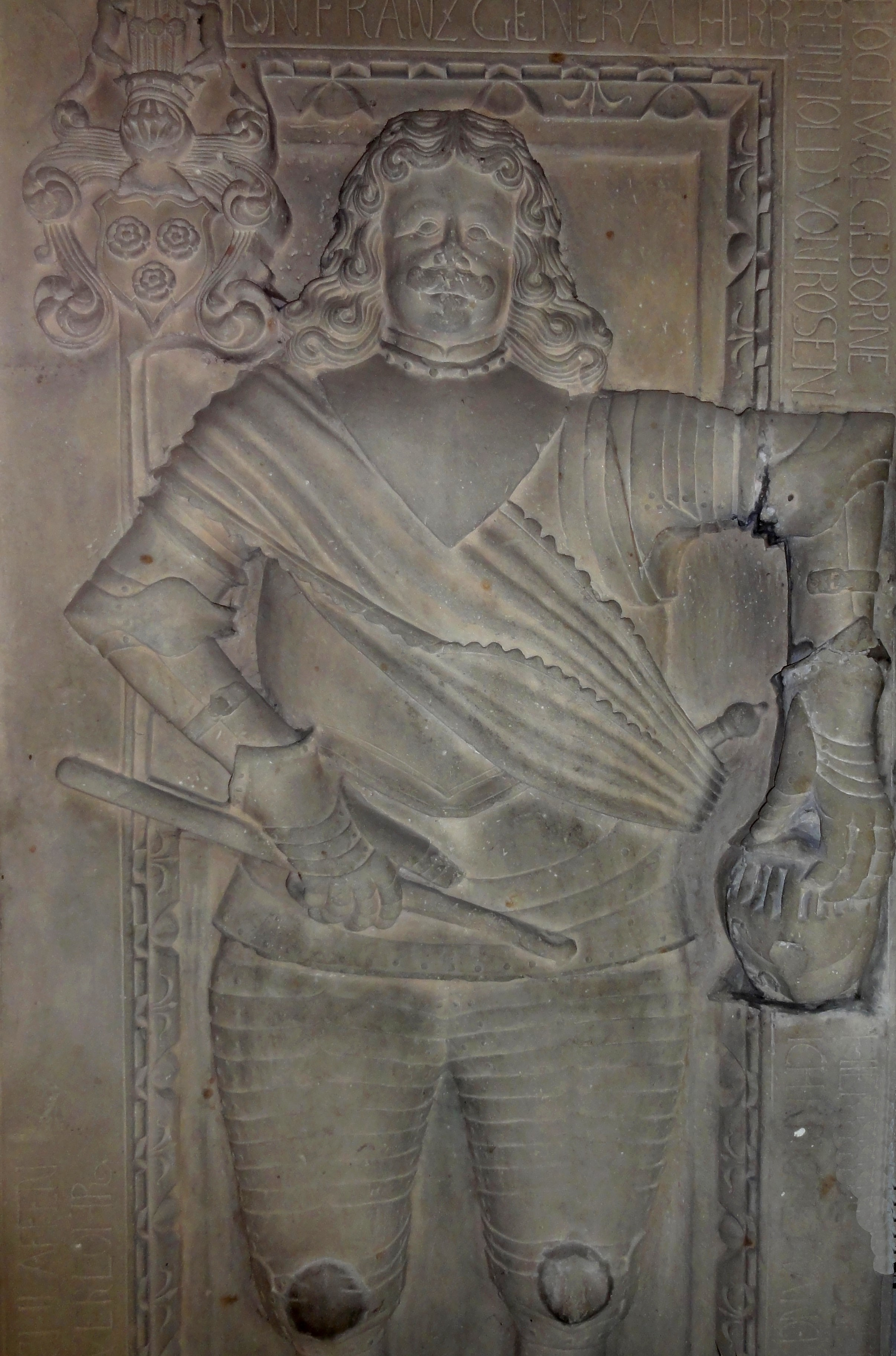 Alsace, Bas-Rhin, Église simultanée Saint-Jacques le Majeur de Dettwiller (PA00084690, IA00055620). Dalle funéraire de Reinhold de Rosen (XVIIe)